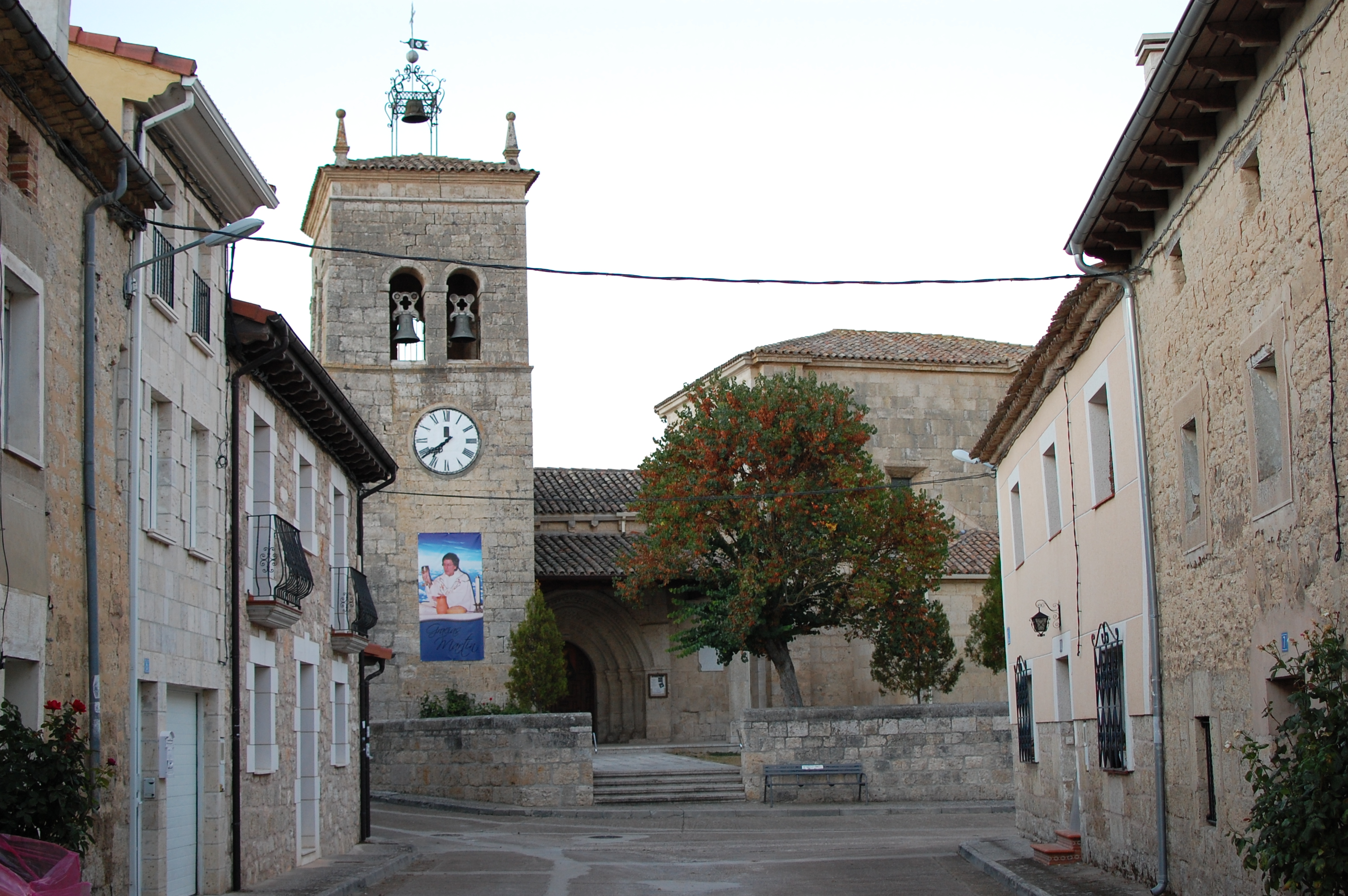 Iglesia